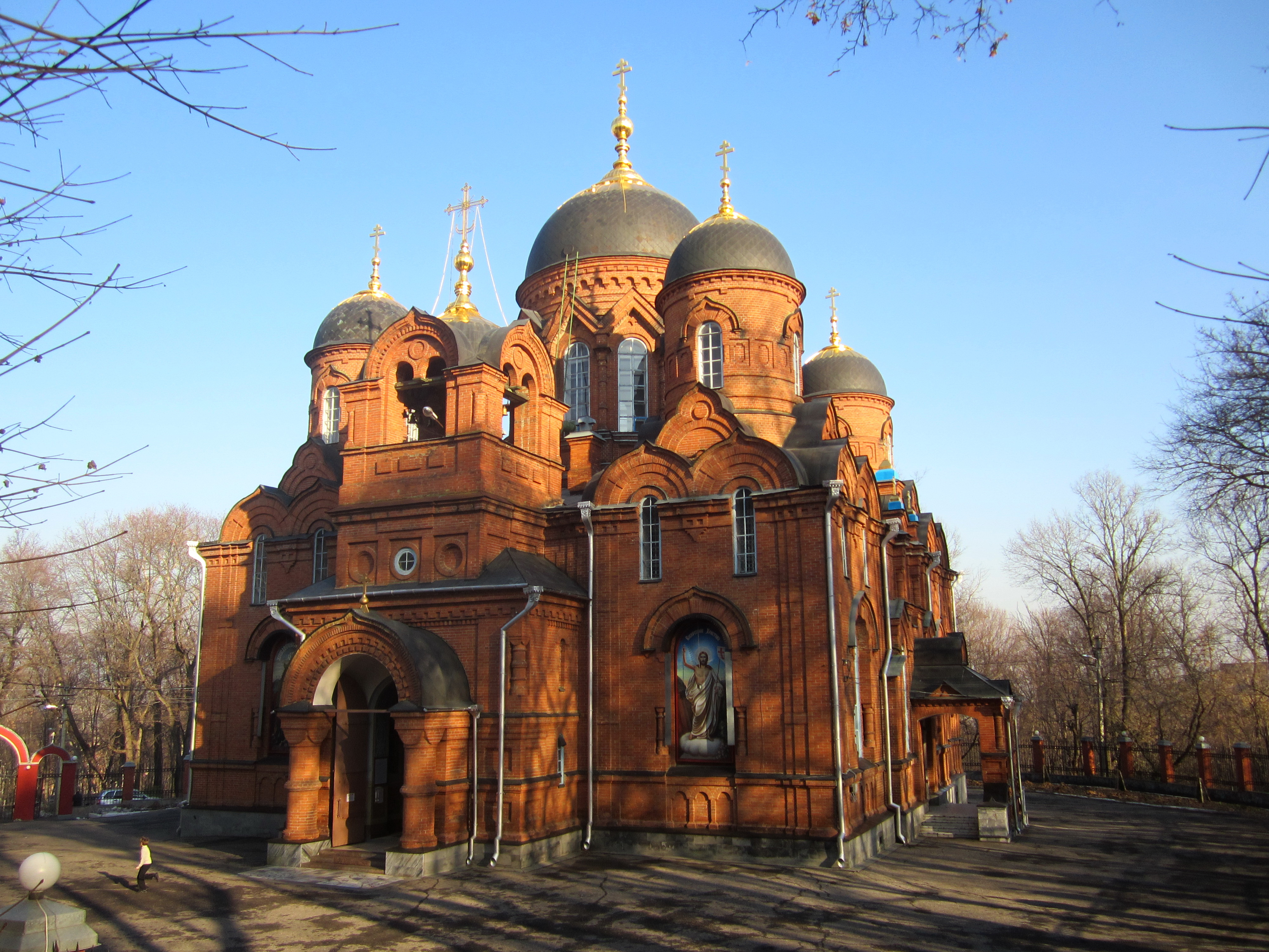 Успенский кафедральный собор (мироносицкая церковь) с интерьером (Пензенская область, Пенза, мироносицкое кладбище)